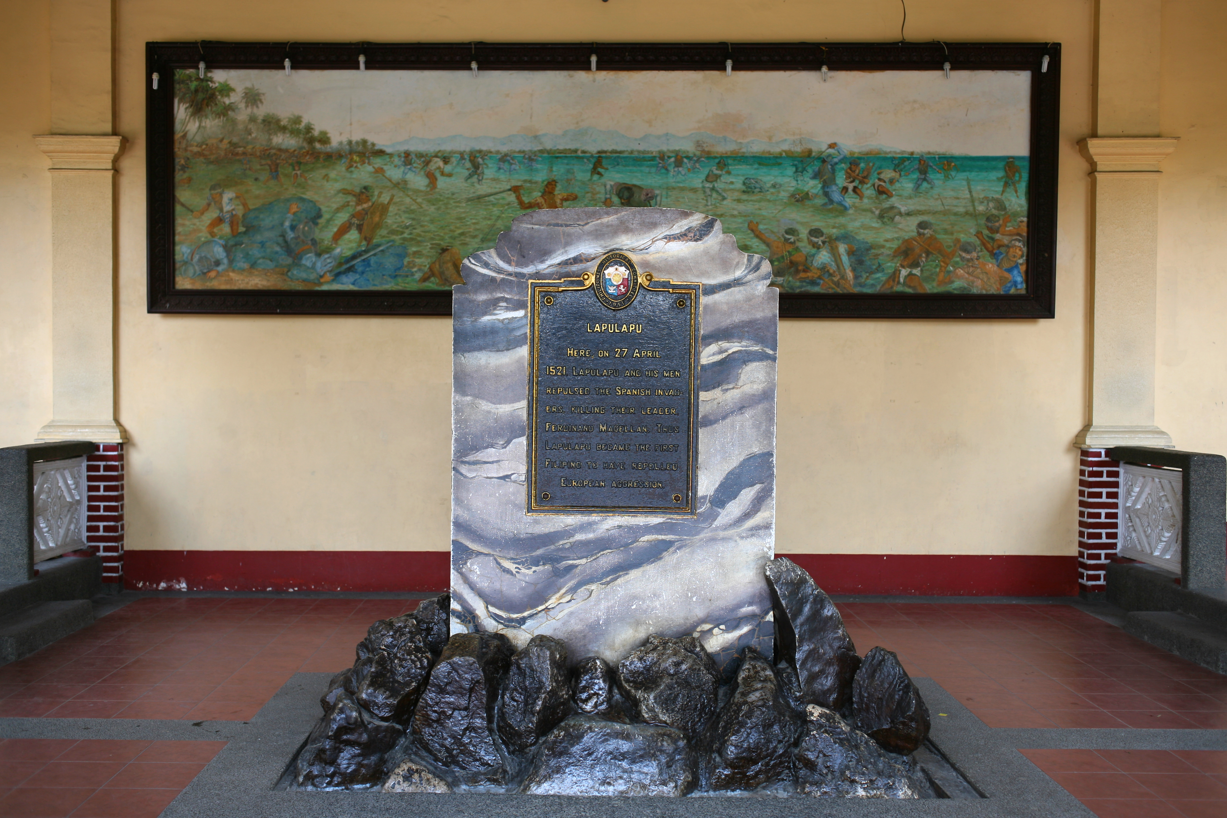 Targa a ricordo di Lapu-Lapu, Mactan, Filippine, posta su luogo della battaglia del 1521